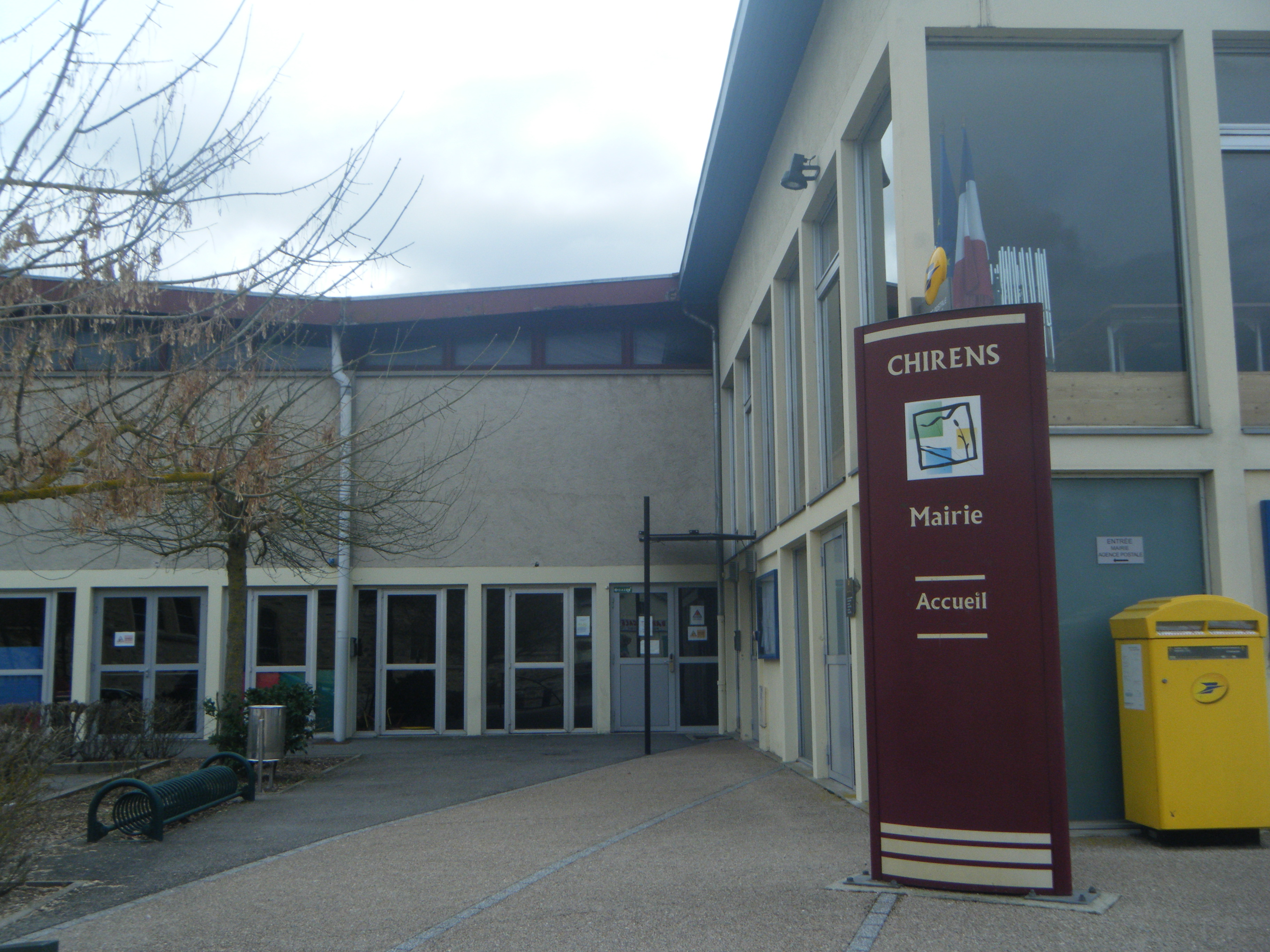 Mairie de Chirens en mars 2019